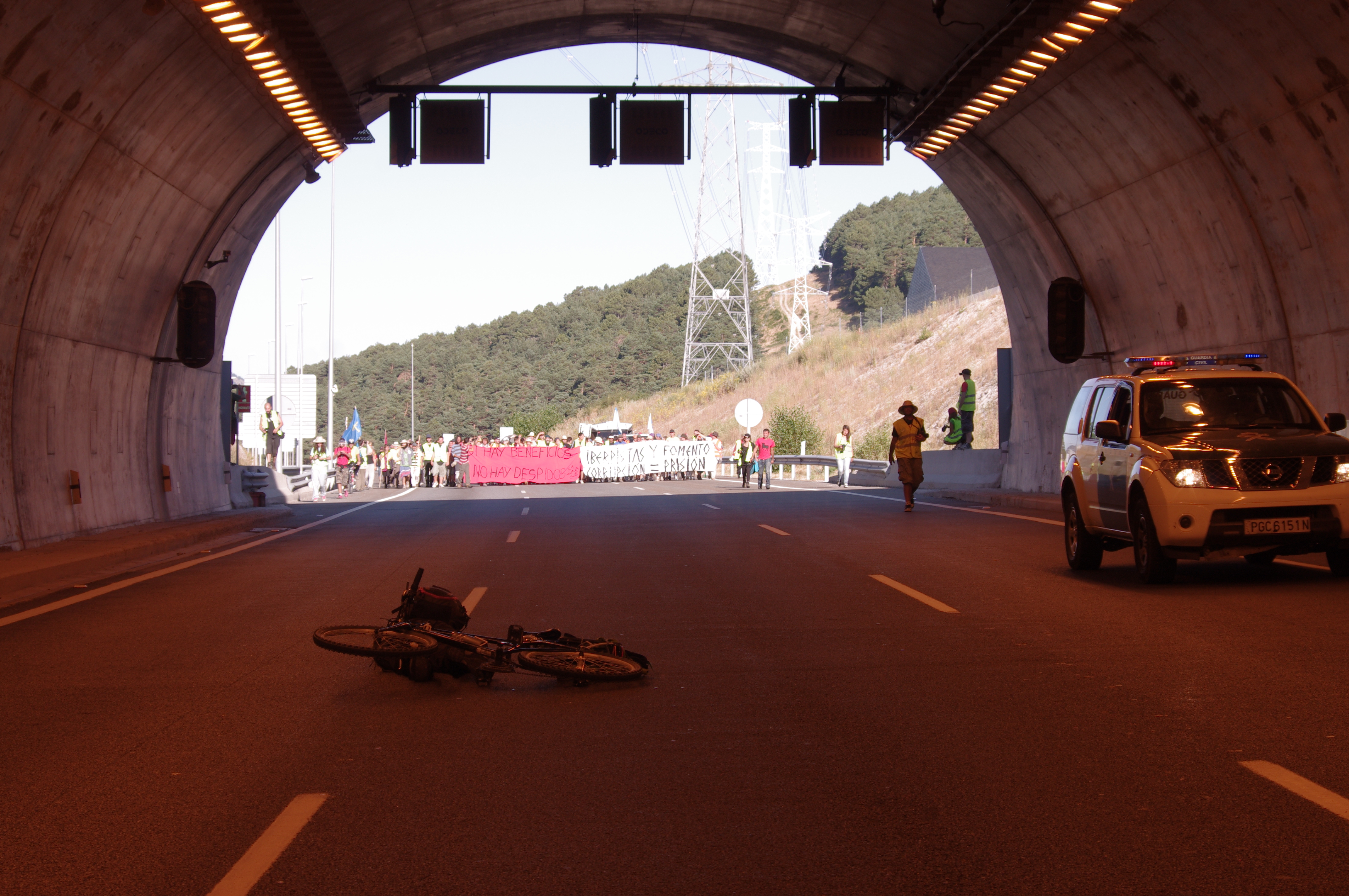 La columna Noroeste pasa el túnel del guadarrama